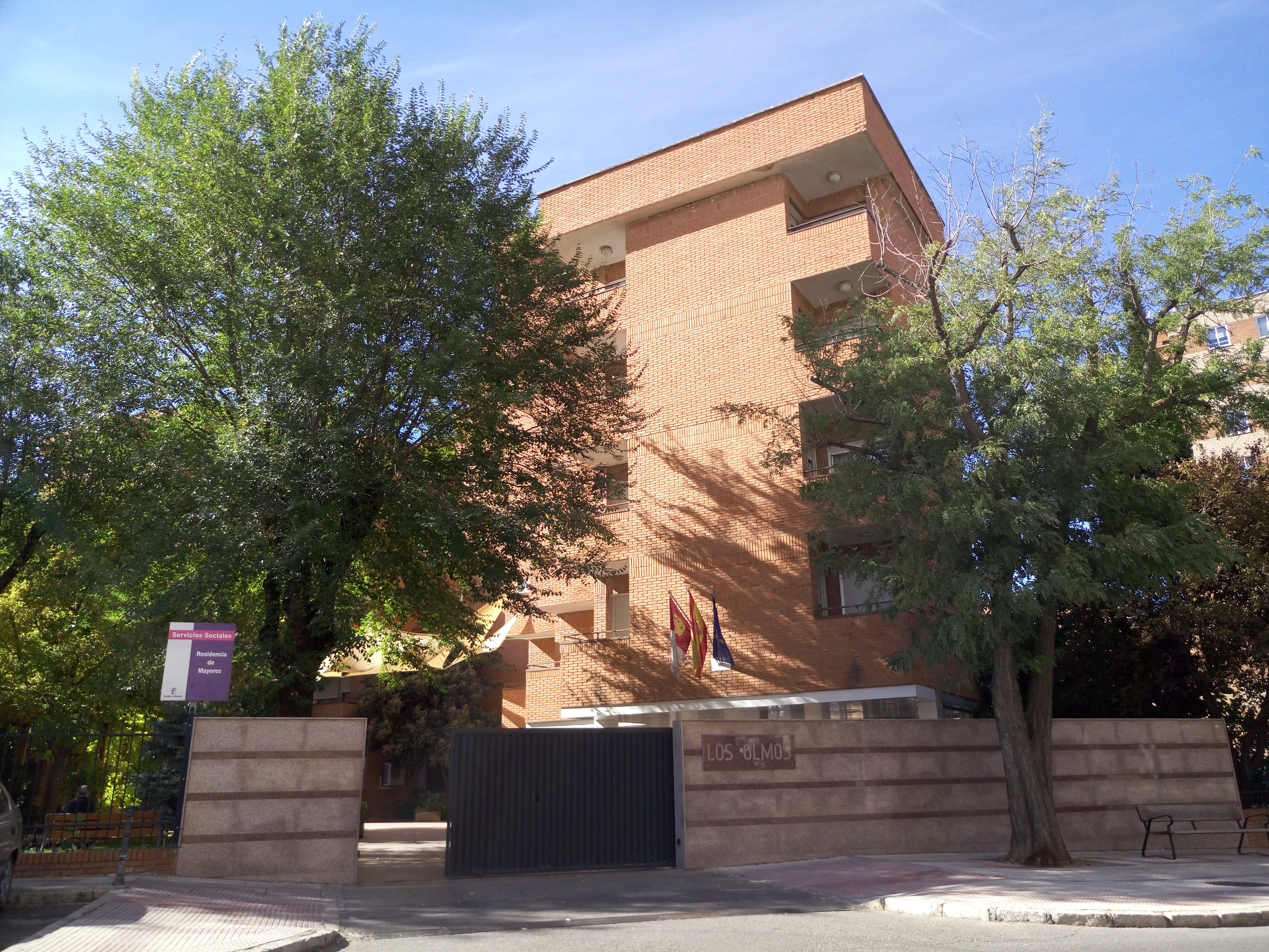 Residencia para personas mayores Los Olmos. Guadalajara (España).